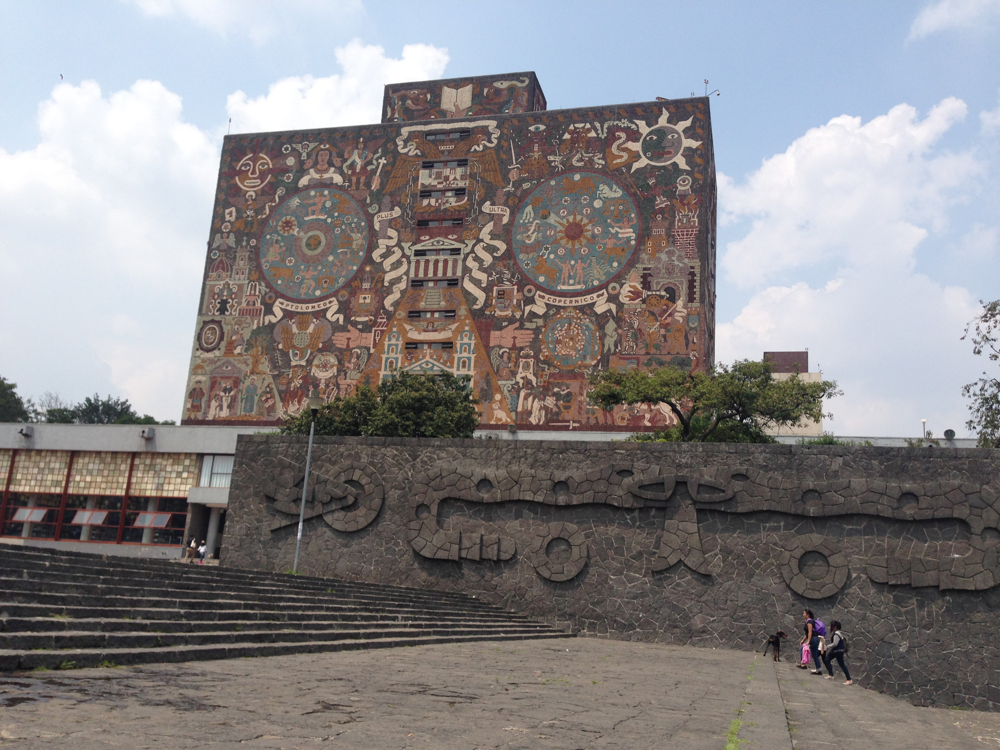 Biblioteca Central, UNAM